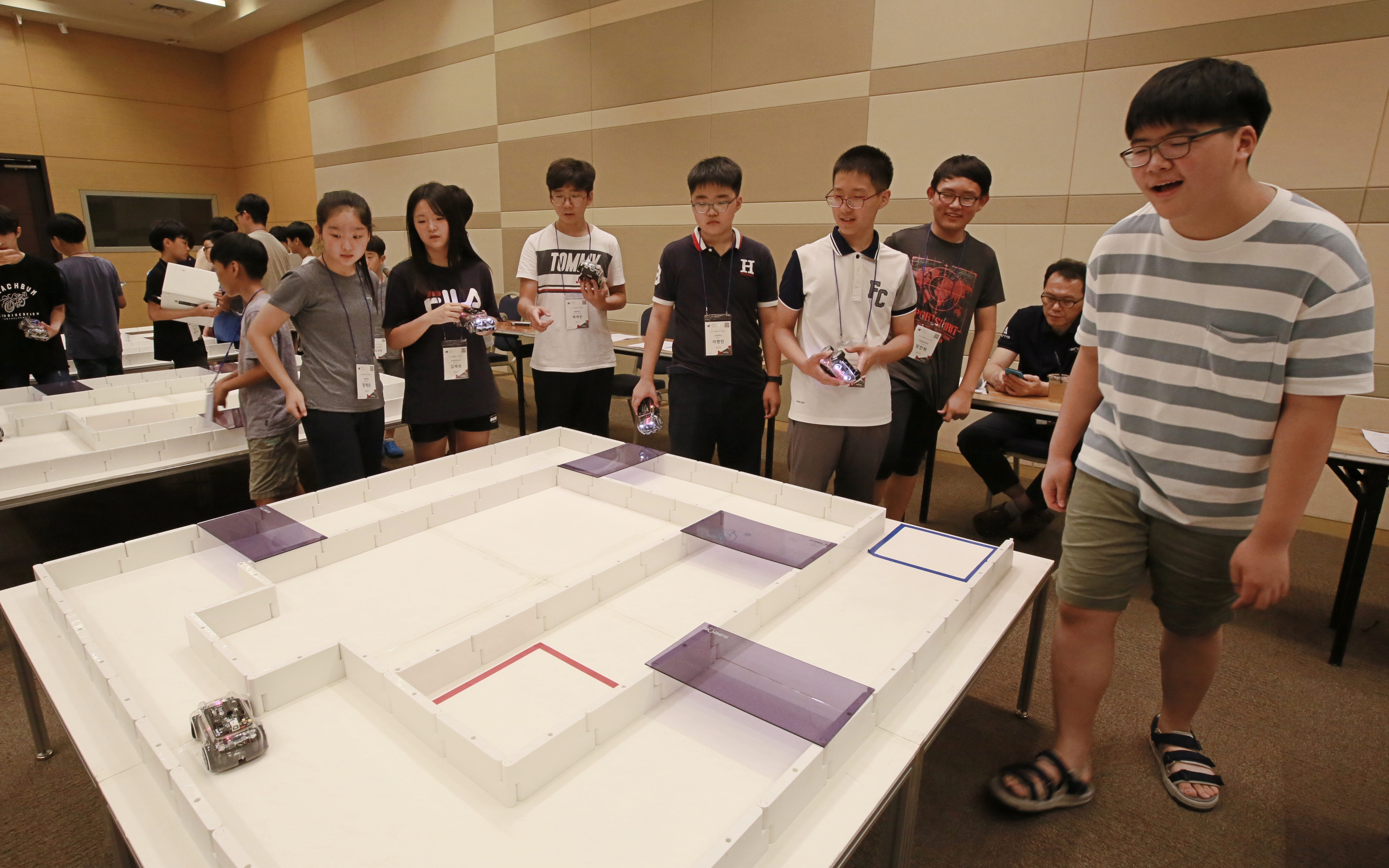 2018 대전로봇융합페스티벌 5